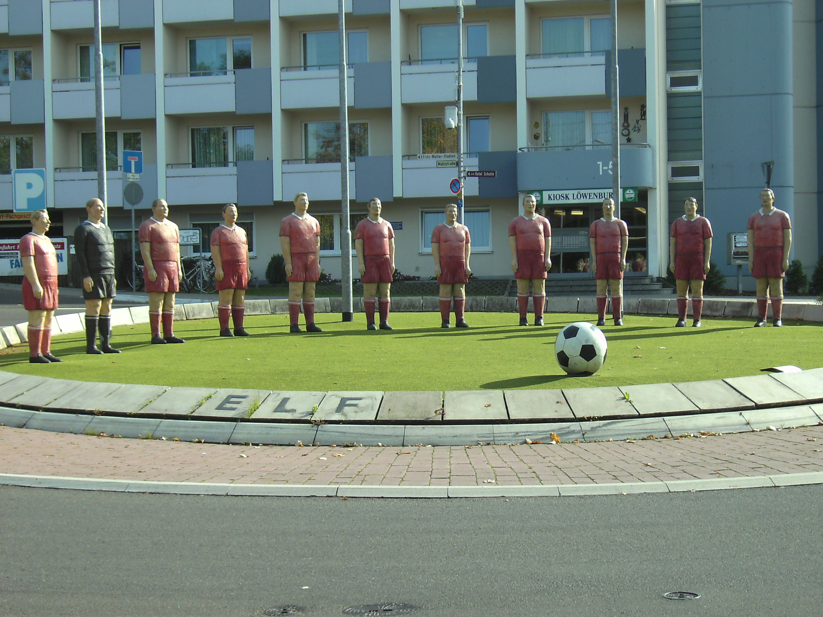 Kaiserslautern: Plastik "Fritz-Walter-Elf" am Betzenberg-Verkehrs-Kreisel